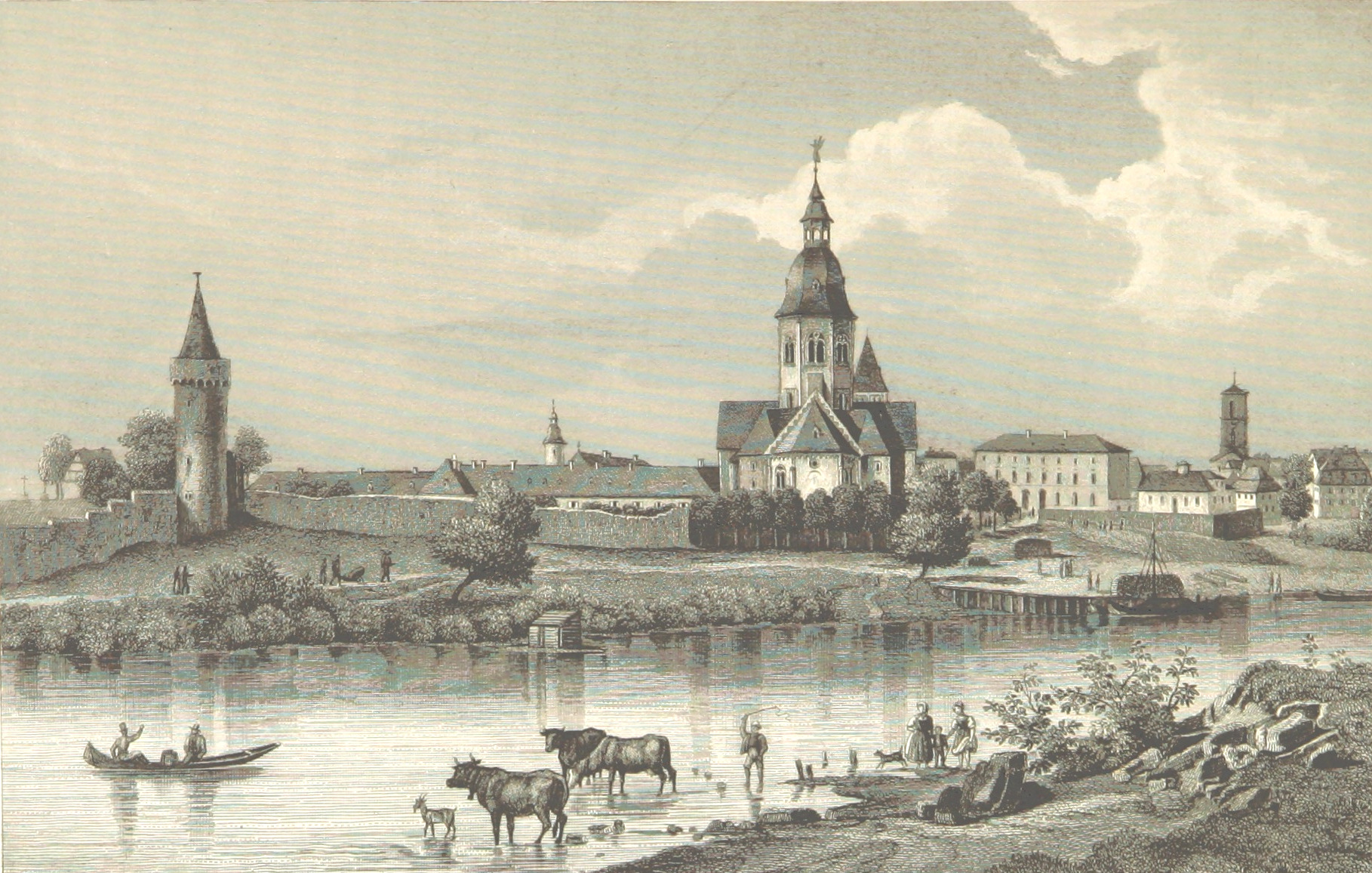 Seligenstadt um 1845. Stahlstich nach Fritz Bamberger (1814-1873) aus dem Buch "Die Mainufer und ihre naechsten Umgebungen, mit 54 Stahlstichen, nach Originalzeichnungen von Fritz Bamberger nebst einer Stromkarte vom Main" von Ludwig Braunfels (Text). Erschienen in Würzburg bei Etlinger in Lieferungen von 1844 bis 1847.